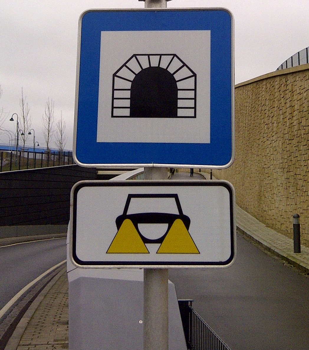 Verkéiersschëld E,28a "Tunnel" aus dem lëtzebuerger Code de la Route.